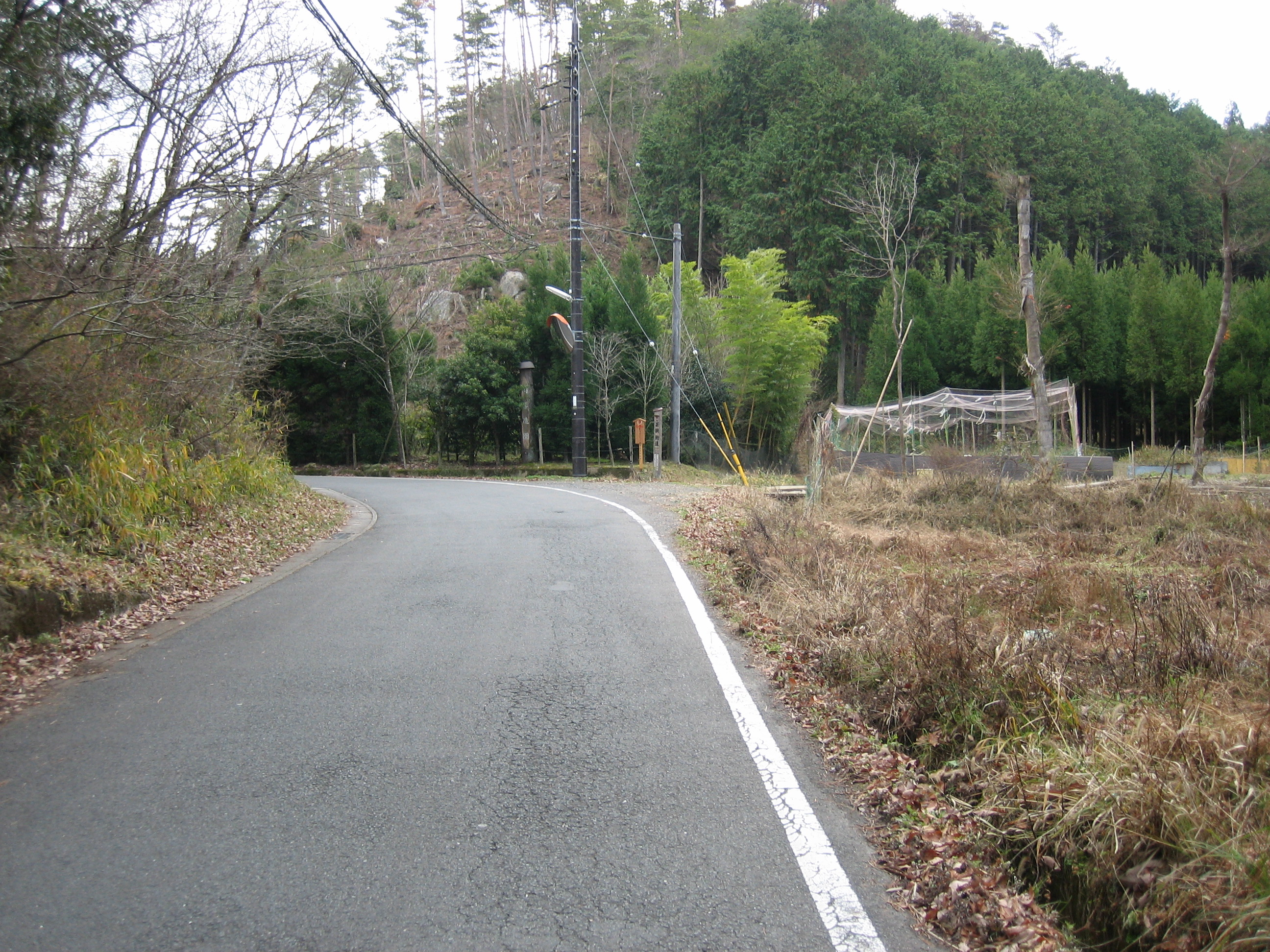 前坂付近の道路を撮影